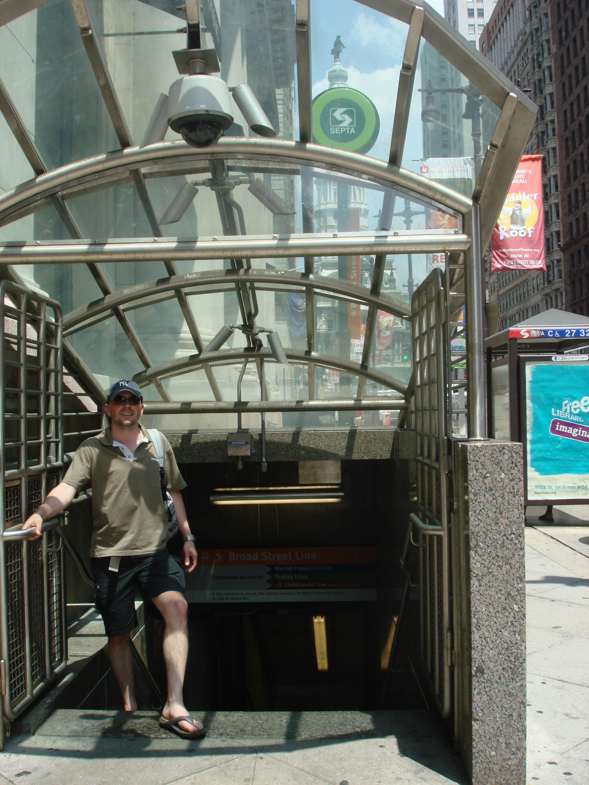 entrée de la broad street Line